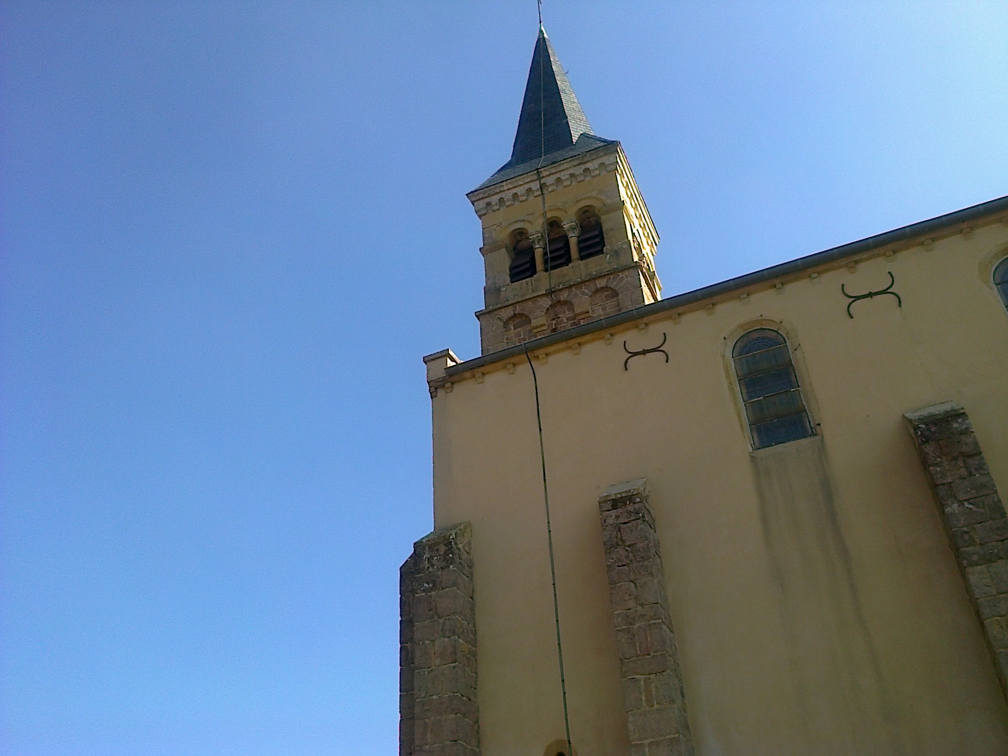 Eglise de Pruzilly